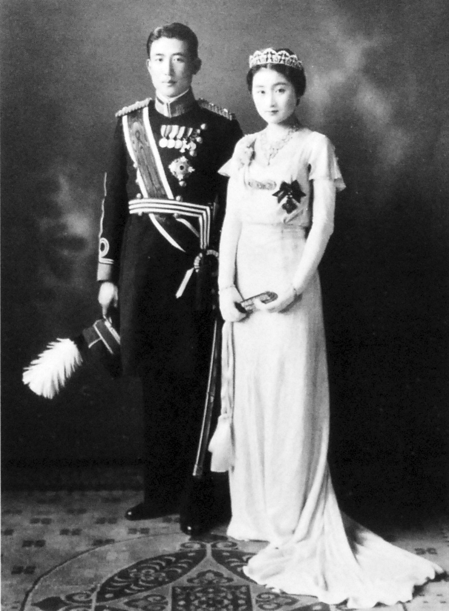 北白川宮永久王(Kitasirakawa-no-miya Nagahisa)と祥子(Sachiko)妃の結婚式。